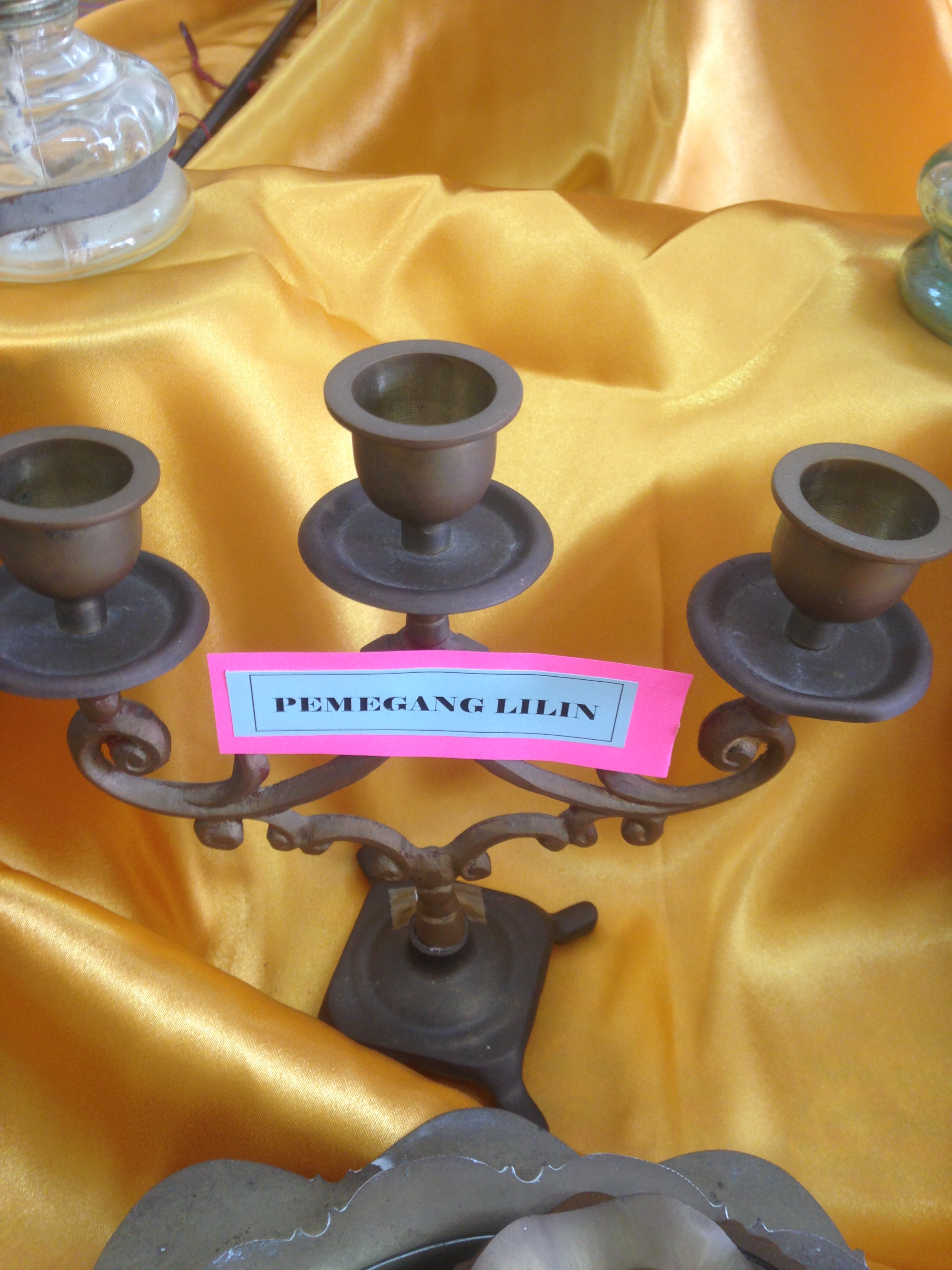 PEMEGANG LILIN